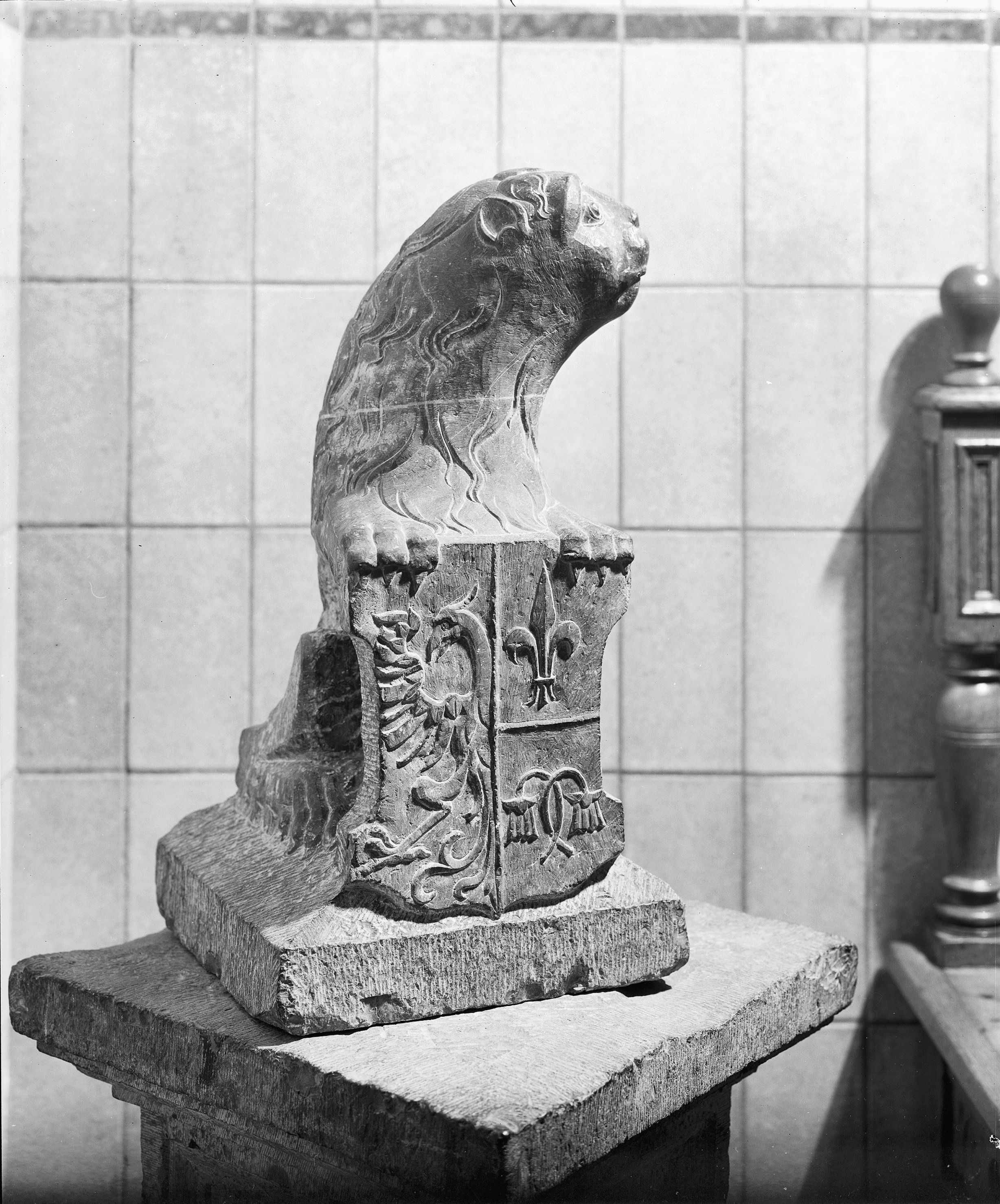 Gemeentehuis: pilaster en kapiteel van slotpoort